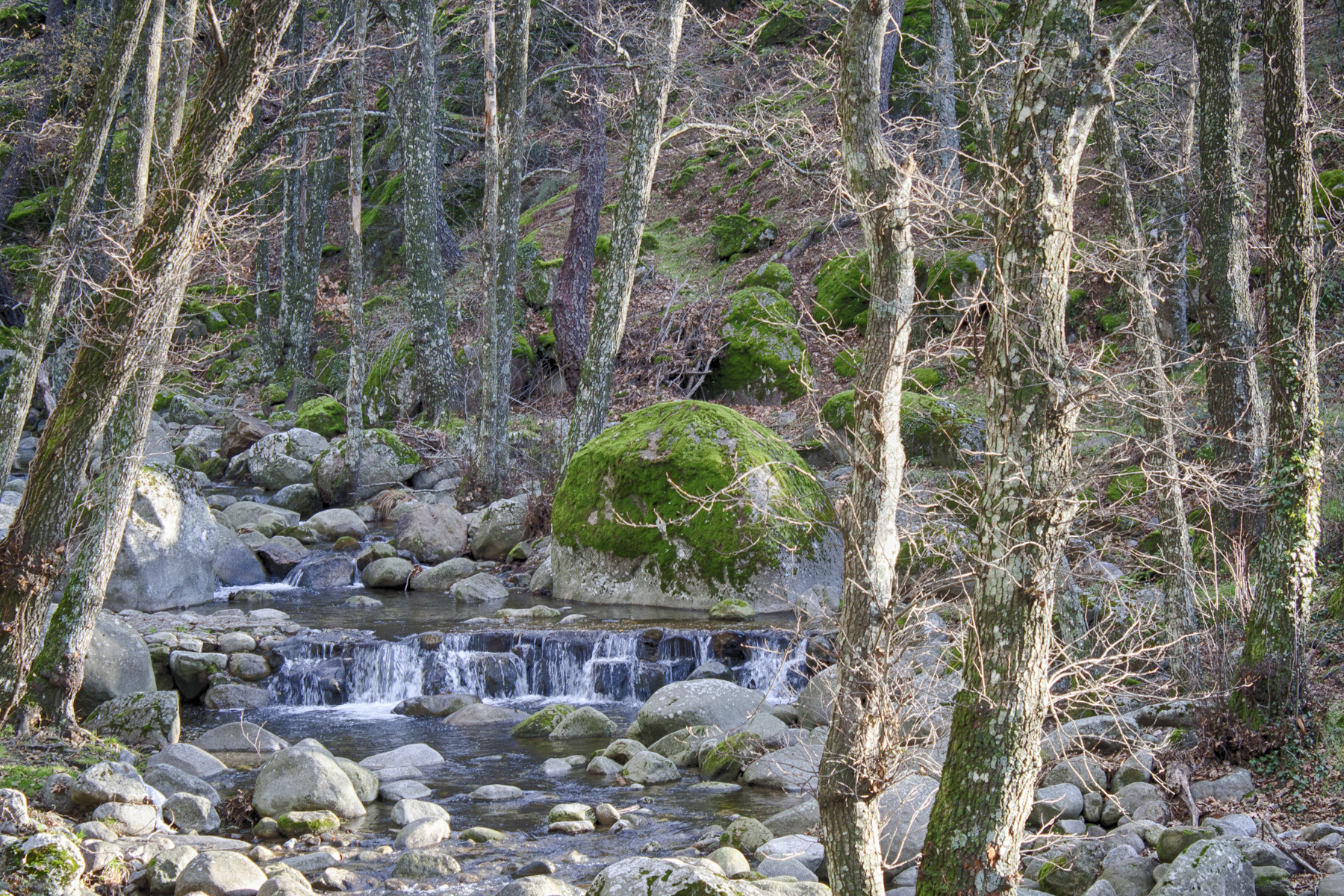 Garganta de Nuño Cojo Piedralaves Provincia de Ávila Castilla y León España